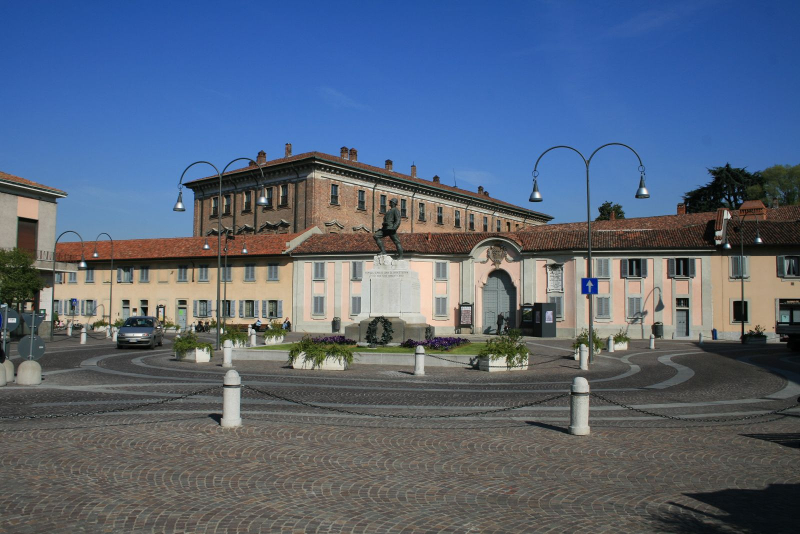 Lainate Vittorio Emanele II Square